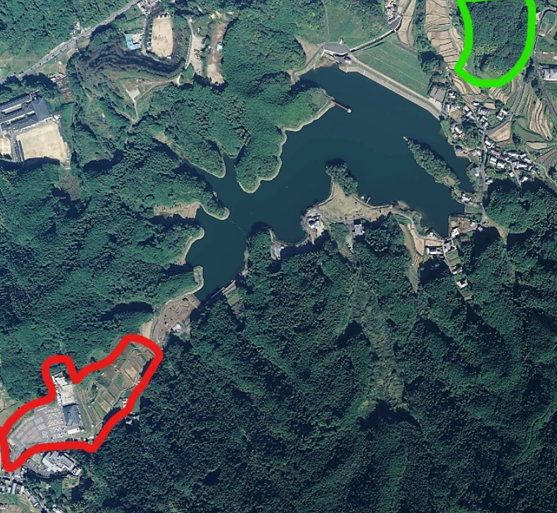 赤で囲った部分が卑弥呼の庄、緑で囲った部分が赤坂天王山古墳